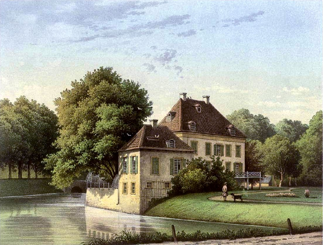 Haus Balken, Kreis Geldern, Rhein-Provinz